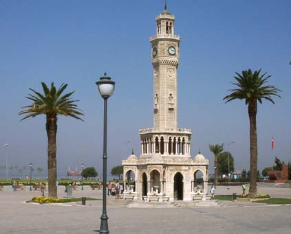 Uhr-Turm in Izmir - GNU-FDL - selbst fotografiert